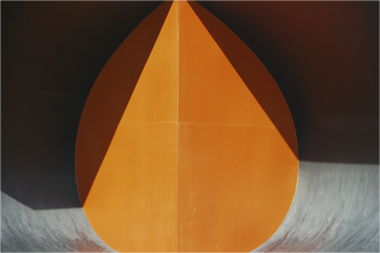 Fotoarbeit